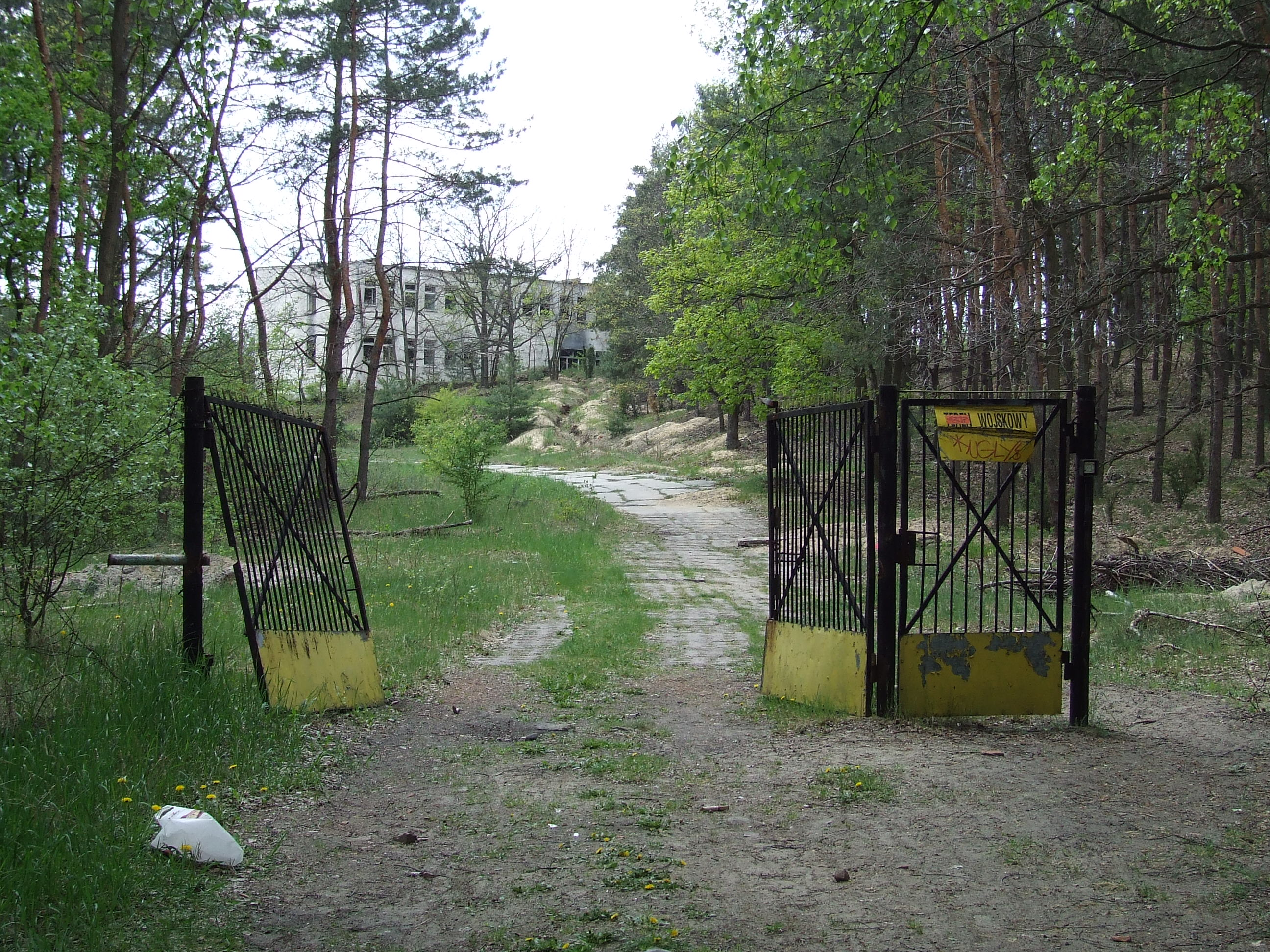 Atomowa Kwatera Dowodzenia, Dąbrowa Leśna, wejście